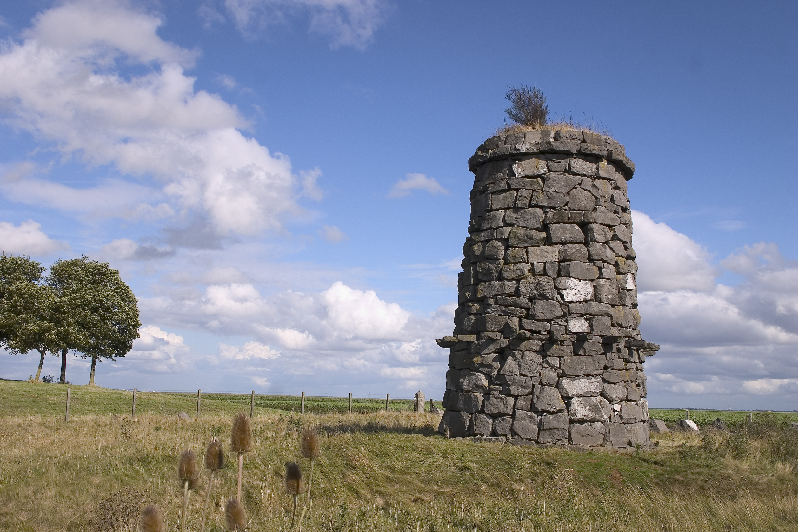 le monument du 9ème régiment d'Ecosse